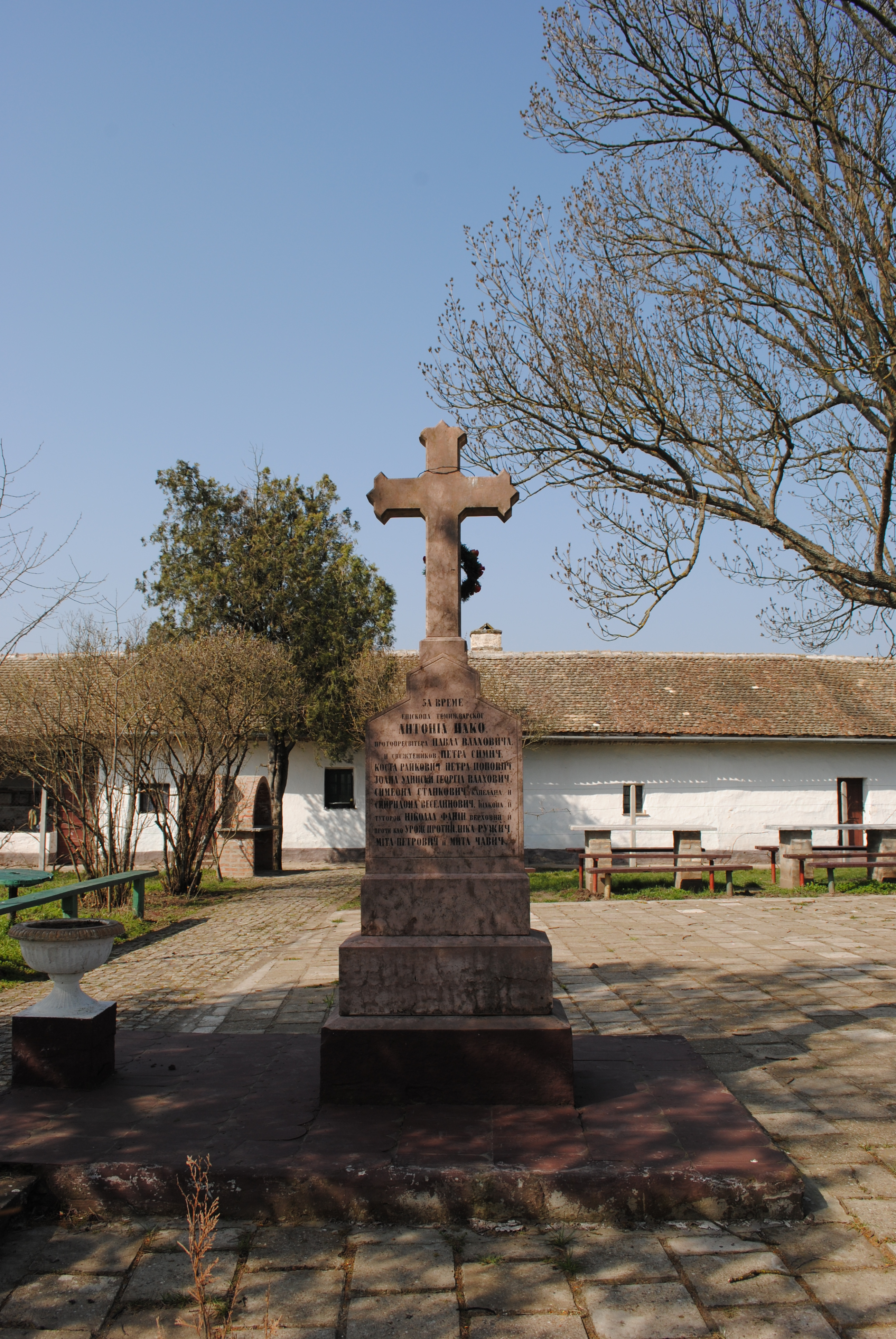 Srpski (latinica): Pored crkvice postavljen je krst na kojem su podaci o osvećenju crkve 1867. godine